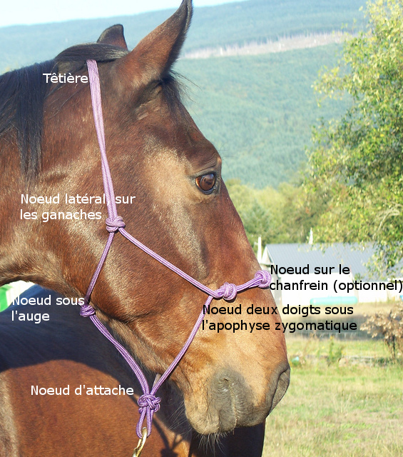 Parties d'un licol éthologique (rope halter)